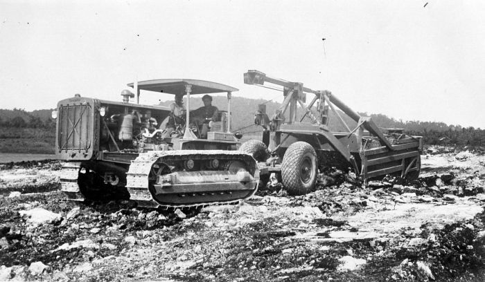 Repronegatief. De aanleg van het vliegveld Sabang op het eiland We, waar de bodem zwaar en rotsachtig is